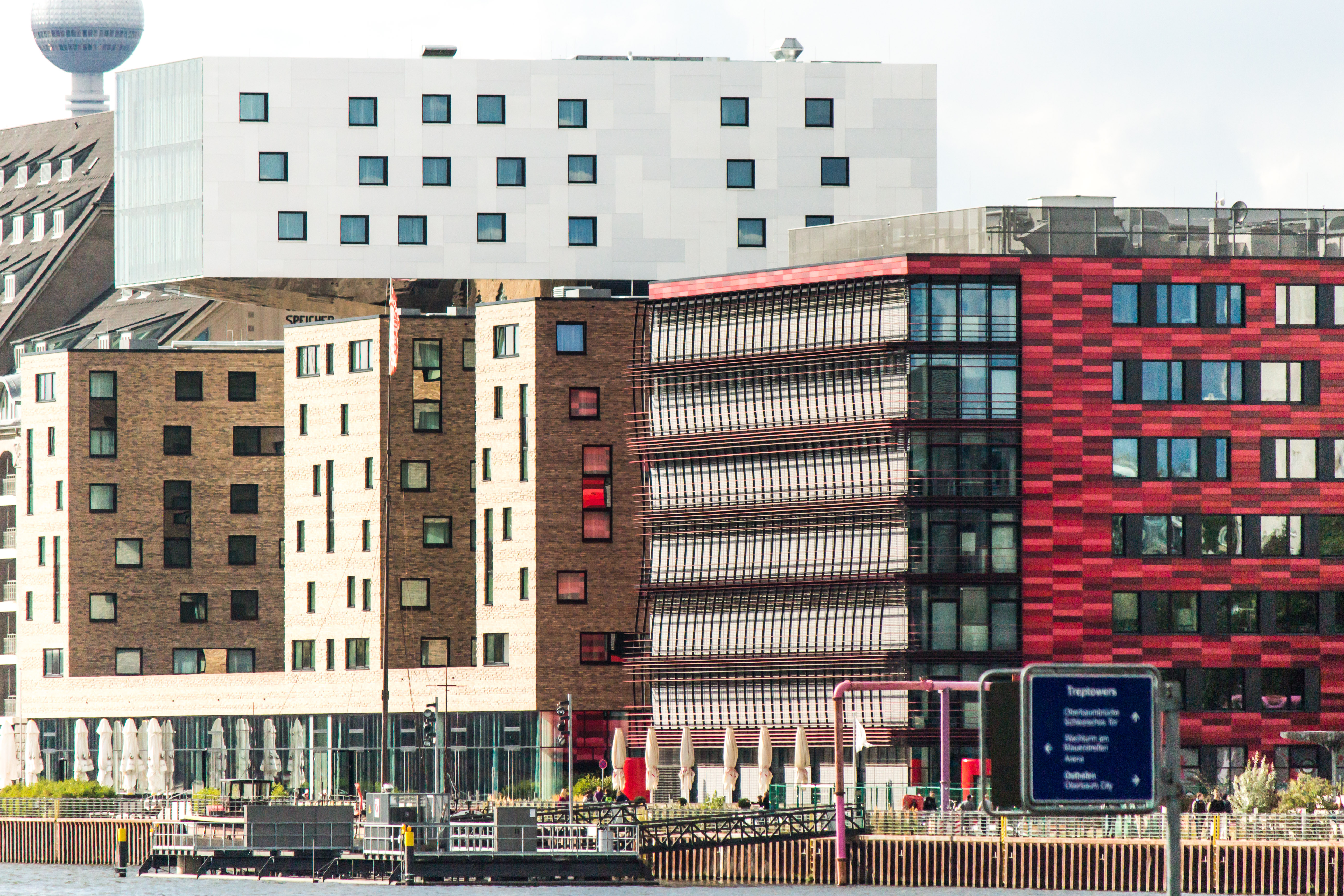 Mediaspree NH Hotel und Coca Cola Haus